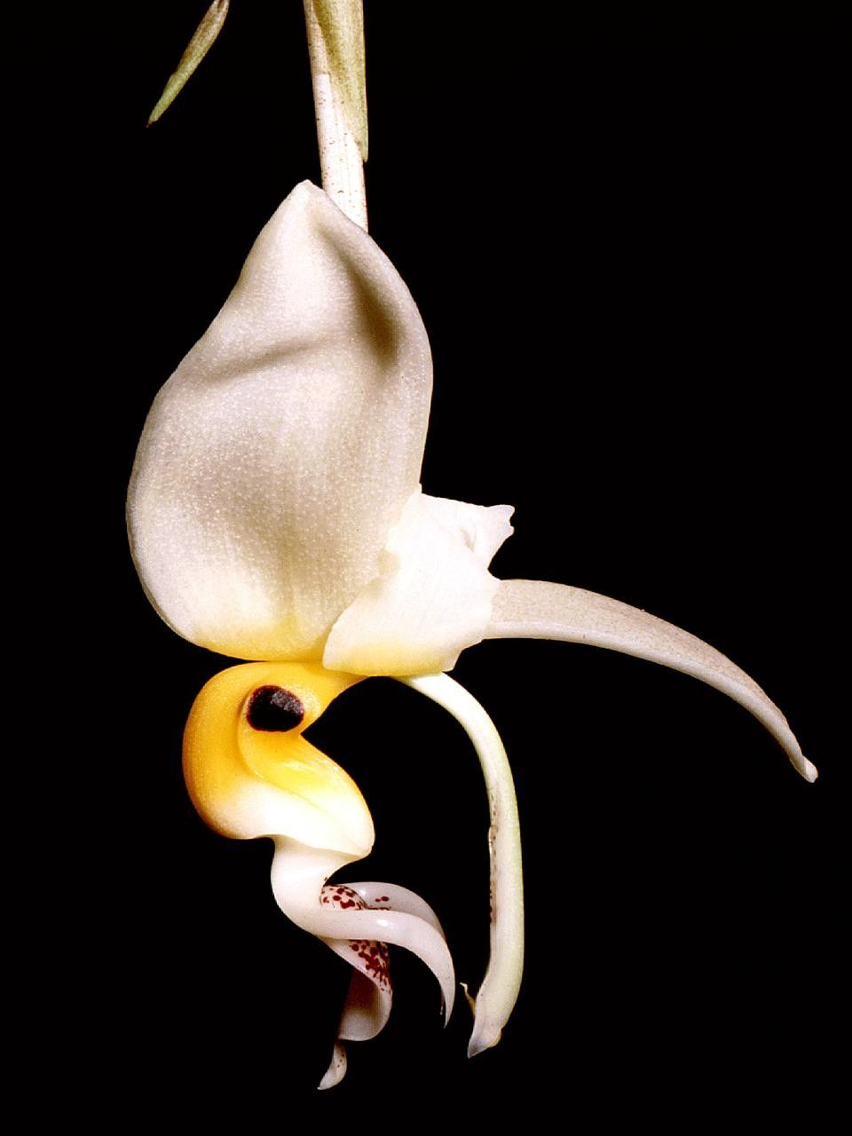 Stanhopea embreei